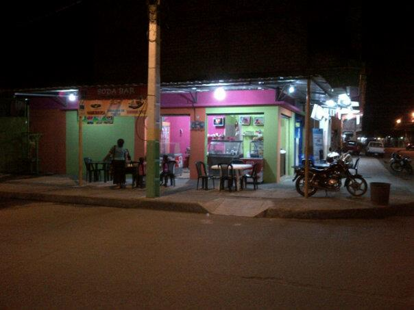 Soda Bar entre las calles Mariana Rodríguez y Franklin Torres.